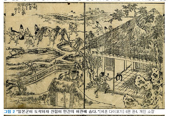 회본태합기 삽화